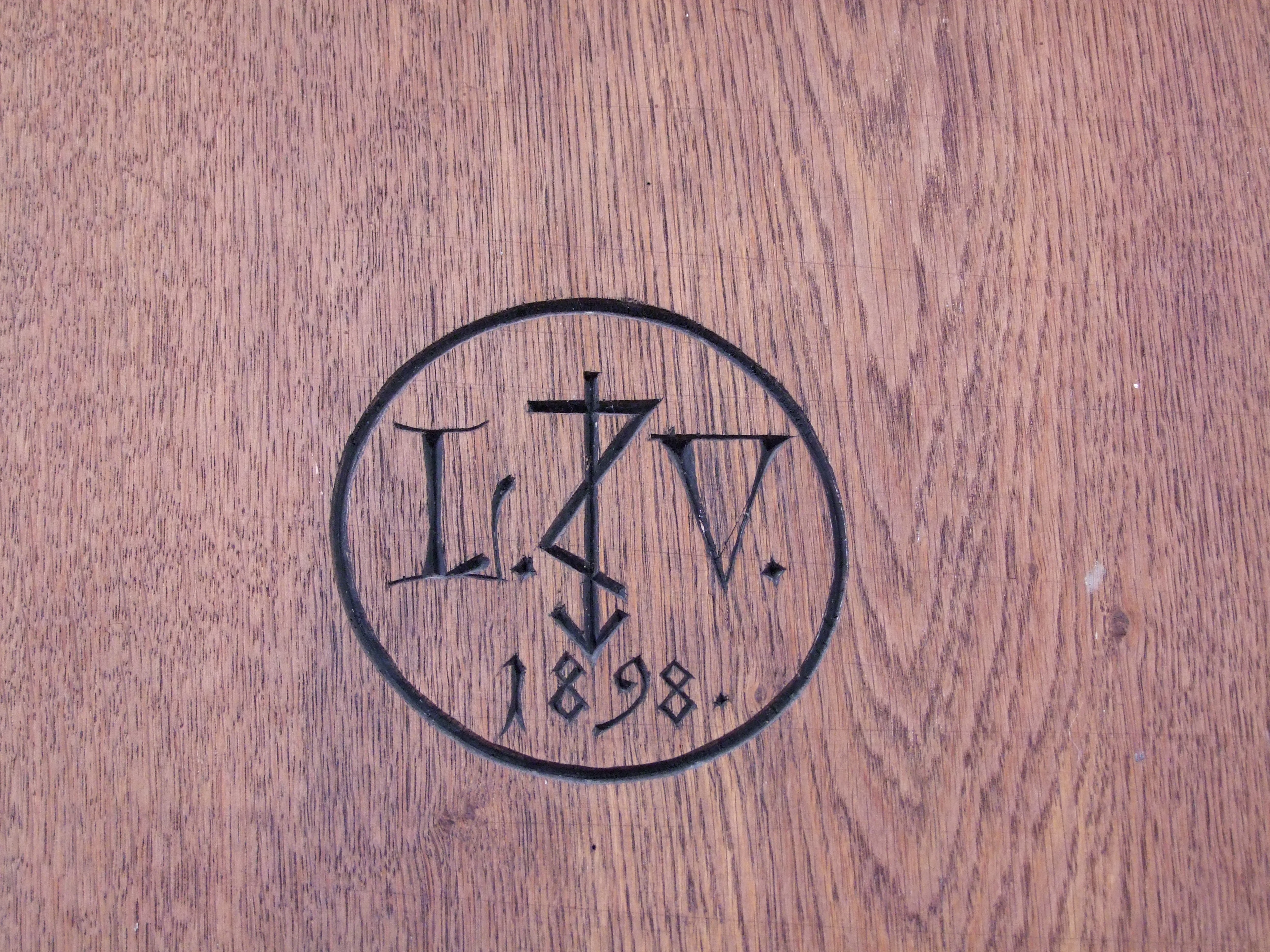 Signatur (Monogramm) Leonhard Vogts am neugotischen Altar in der evangelisch-lutherischen Pfarrkirche St. Agatha in Dickenreishausen. - OpenStreetMap(Info)